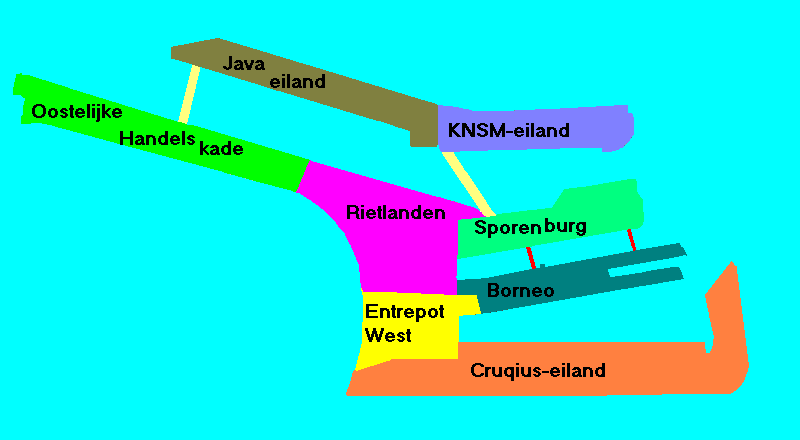 zelf gemaakt